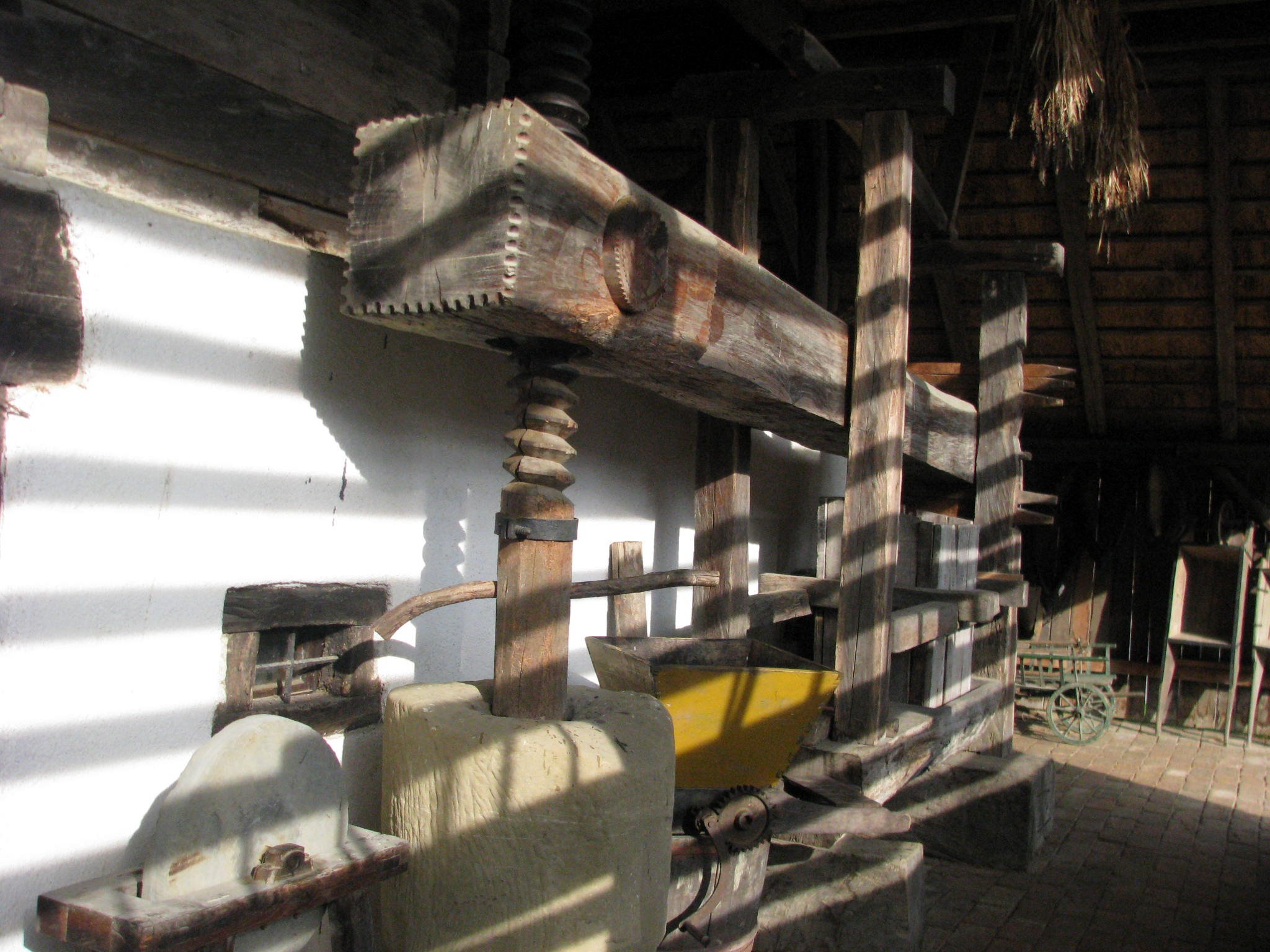 Open air museum, Rogatec, Slovenia